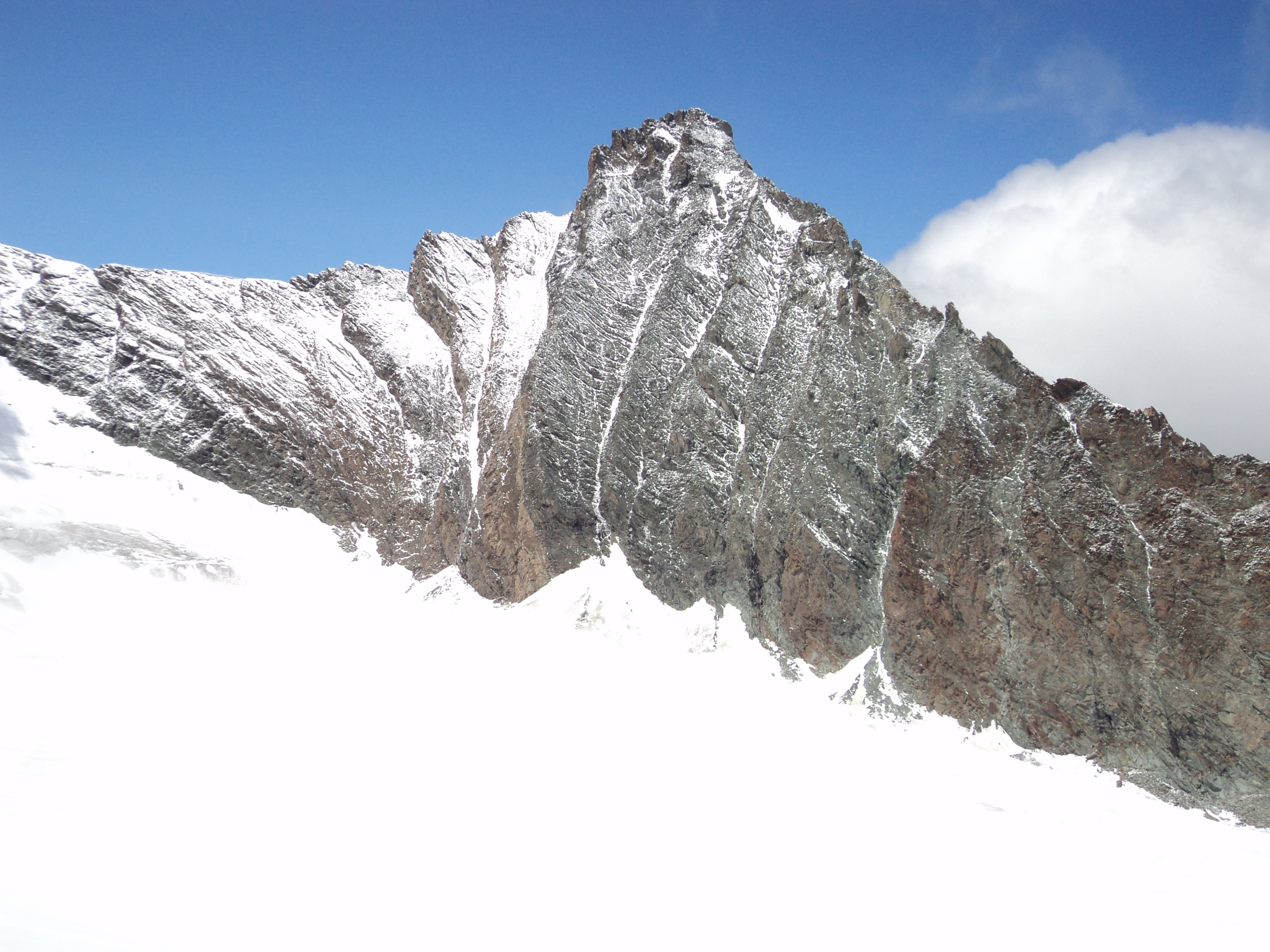 Parete est della Grivola vista dalla Punta Rossa della Grivola. In basso il ghiacciaio del Trajo. Massiccio del Gran Paradiso. Alpi Graie